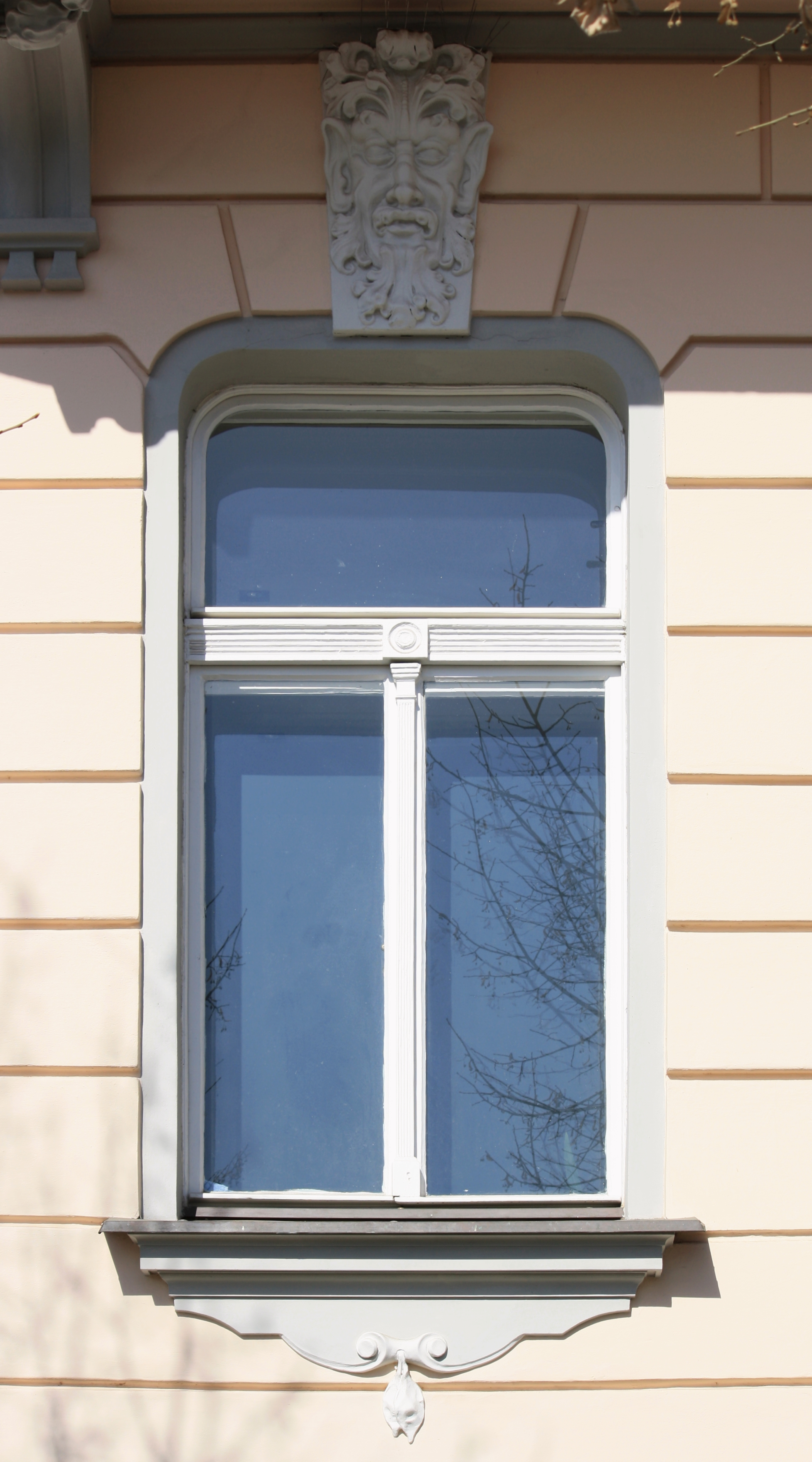 Praha, Vršovice - Kodaňská č. p. 559